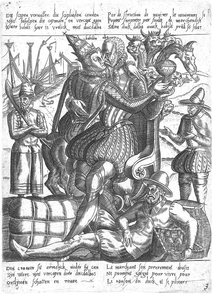 Terwijl Alva vrijt met de hoer van Babylon raakt de economie van het land in verval, ca. 1572 (uit de serie Alva's opdracht in de Nederlanden en de gevolgen van zijn tirannie, 1572).[1] Alternative title(s): Spotprent op Alva en de Katholieke kerk.[2]